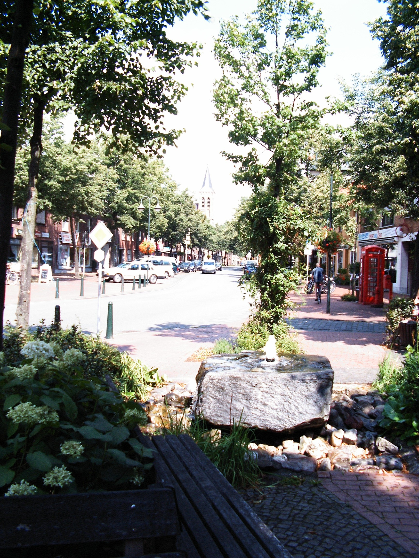 Sonsbeck: Hochstrasse